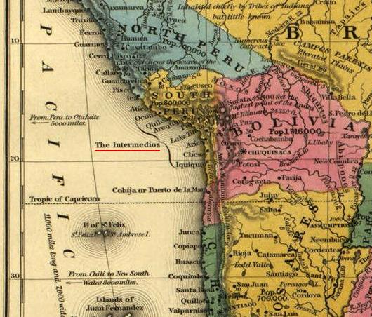 Detalle del mapa de 1839 publicado por Samuel Augustus Mitchell en el que se aprecia los llamados "puertos intermedios", en aquel entonces dentro del Estado Sud Peruano que integraba la Confederación Perú-Boliviana (1836-1839)